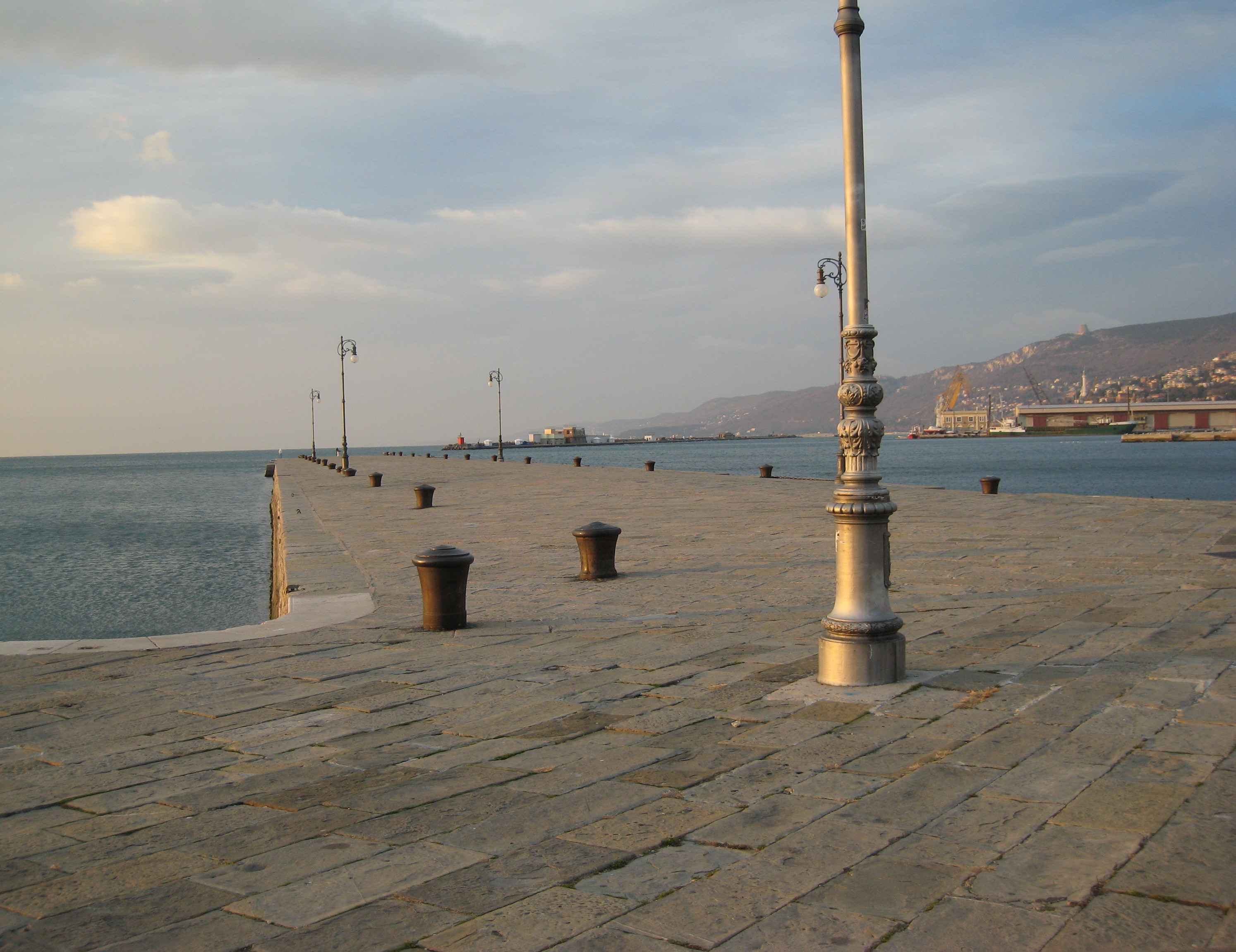 Il molo Audace a Trieste. Dicembre 2007